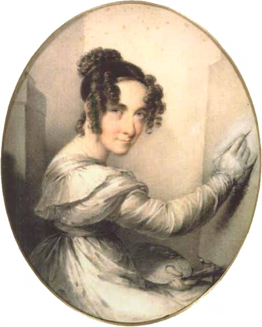 Therese aus dem Winckel – Self-portraittitle QS:P1476,de:"Therese aus dem Winckel – Self-portrait"